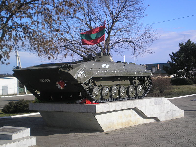 Мемарыял памяці і пакуты ў Бяндэрах